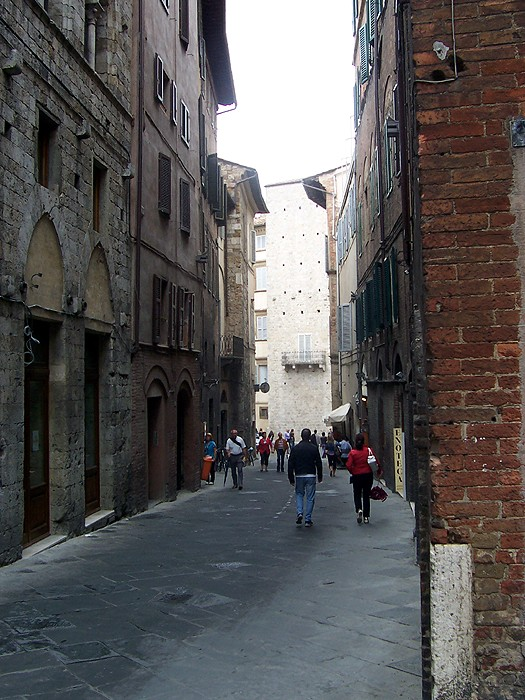 Siena - Via Stalloreggi